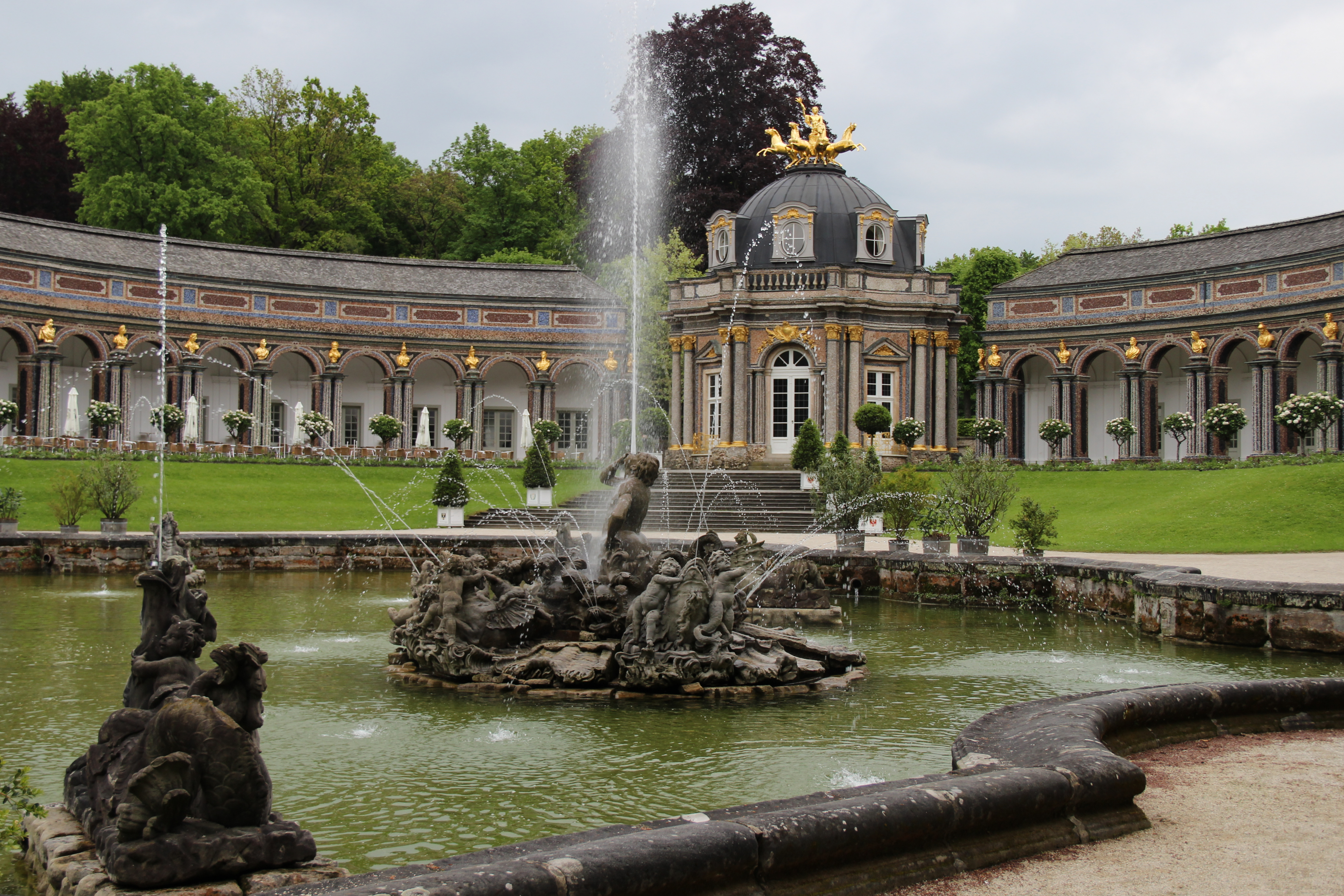 Schloss- und Garten Bayreuth-Eremitage Eremitage Eremitage 1 95448 Bayreuth